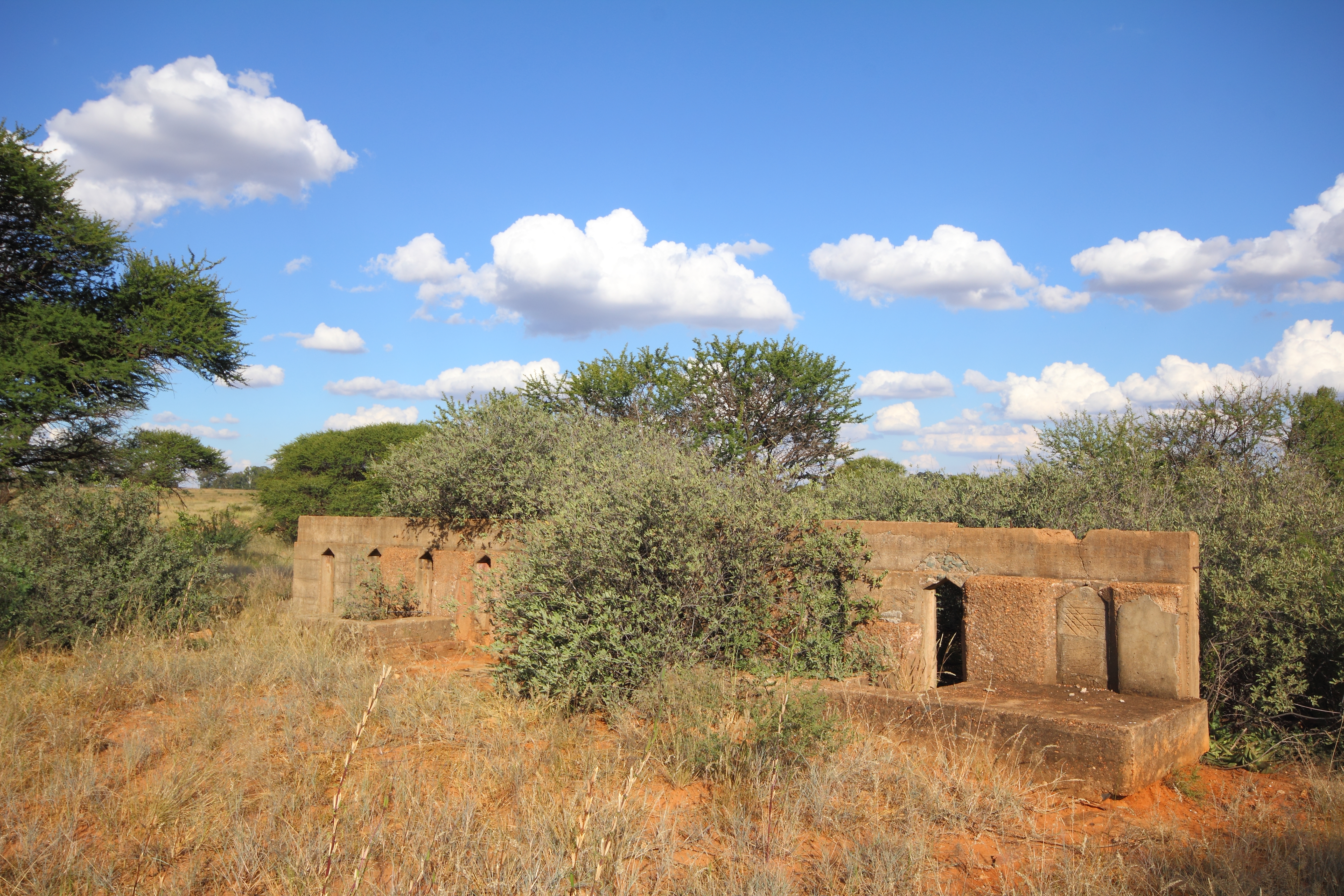 Ruine eines Gebäudes auf dem Gelände des ehemaligen Internierungslagers Andalusia in Jan Kempdorp, Südafrika.